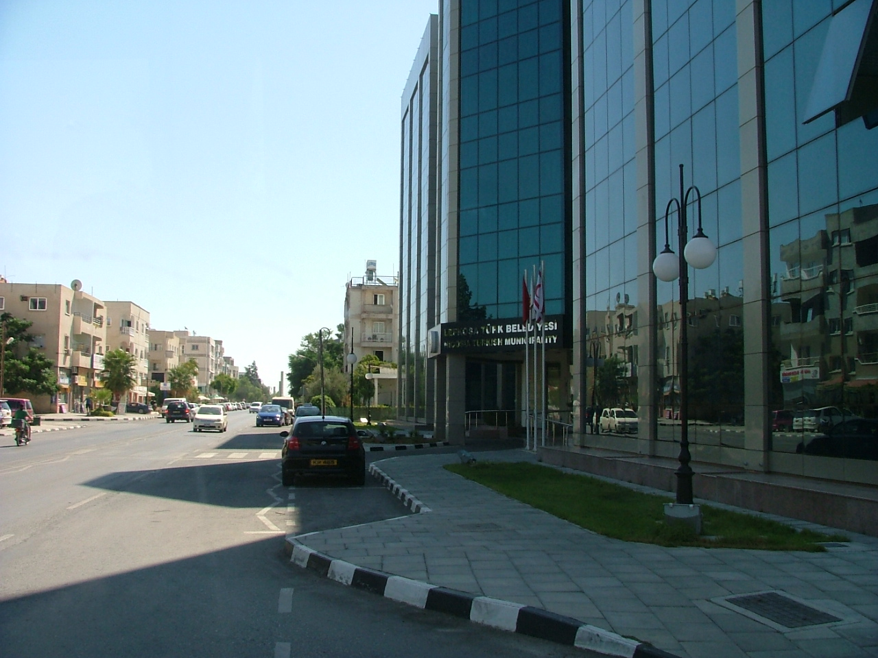 Lefkoşa Türk Belediyesi binası.